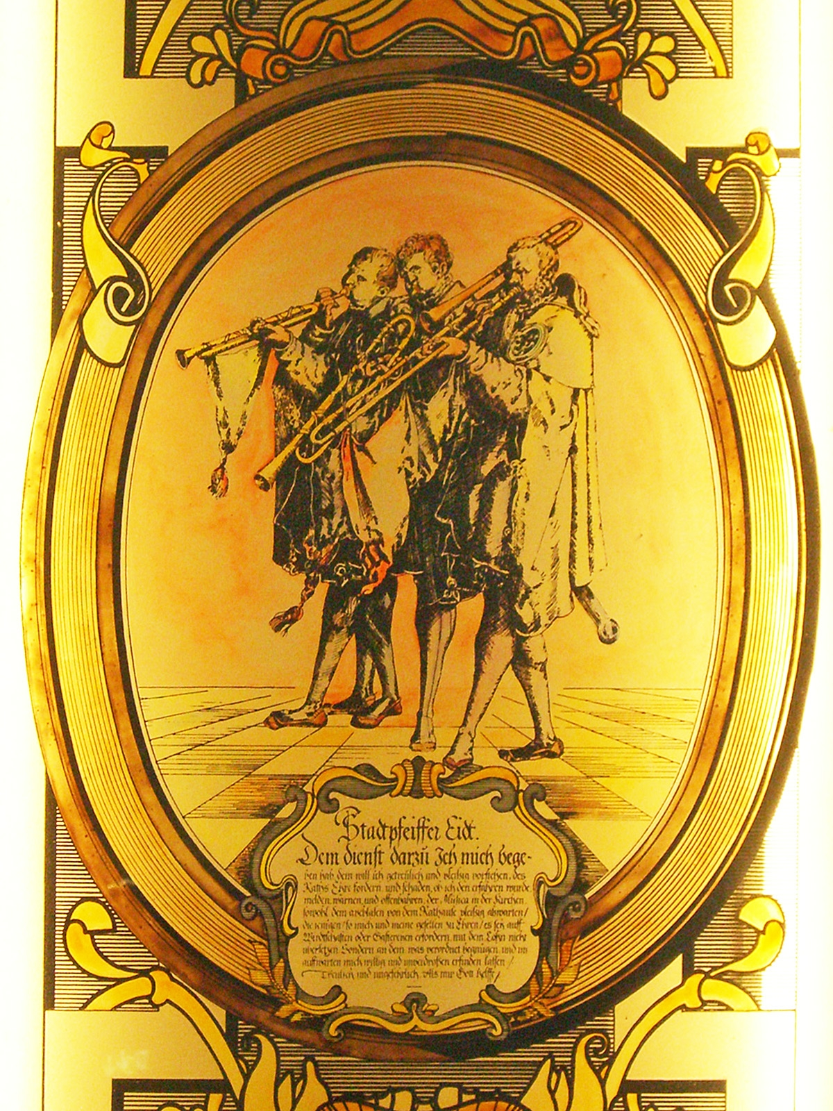 Stadtpfeifer auf einem Glasbild vor dem Leipziger Restaurant Stadtpfeiffer